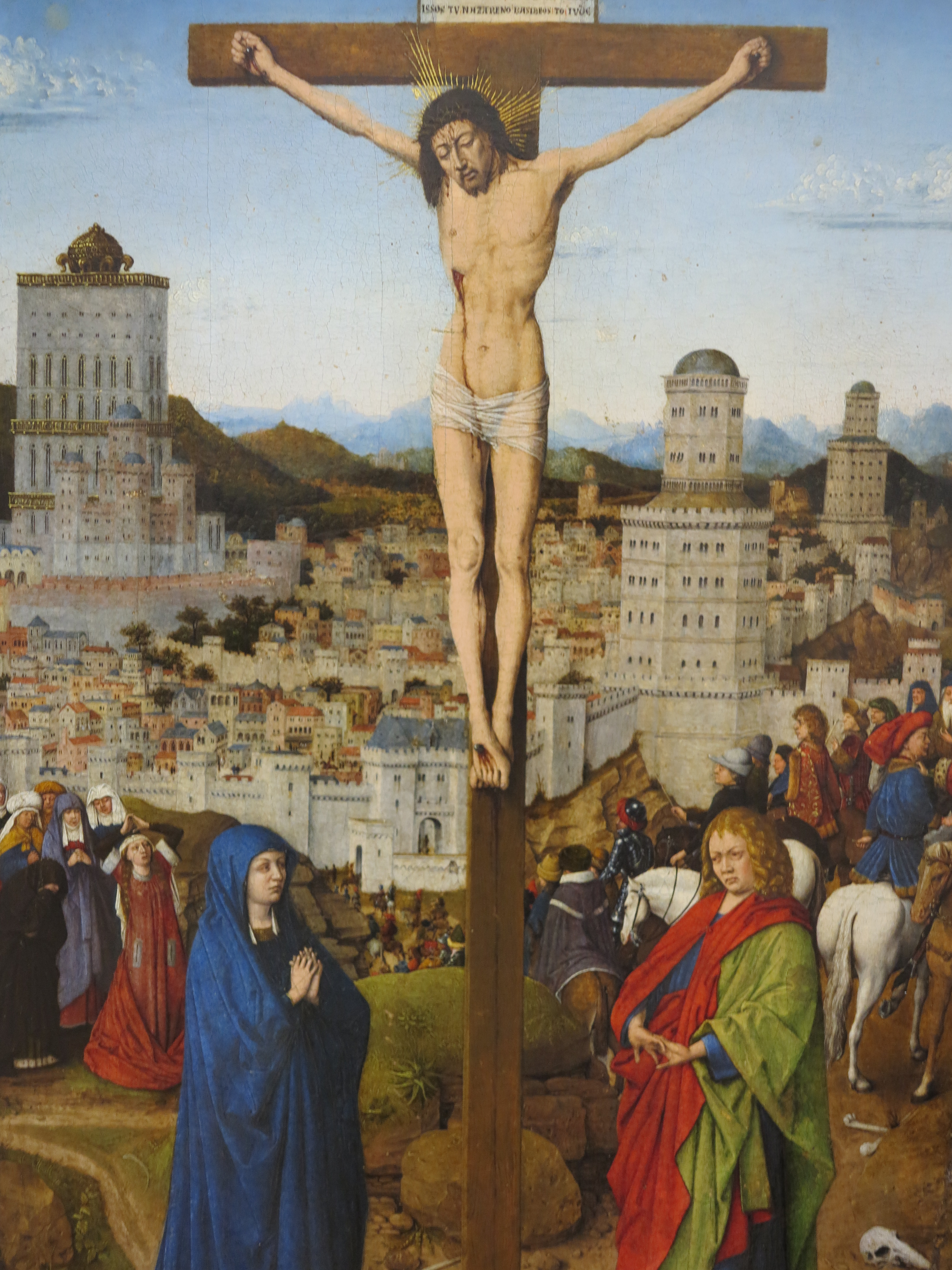 Galleria G. Franchetti alla Ca' d'Oro - MIBAC This is a photo of a monument which is part of cultural heritage of Italy.